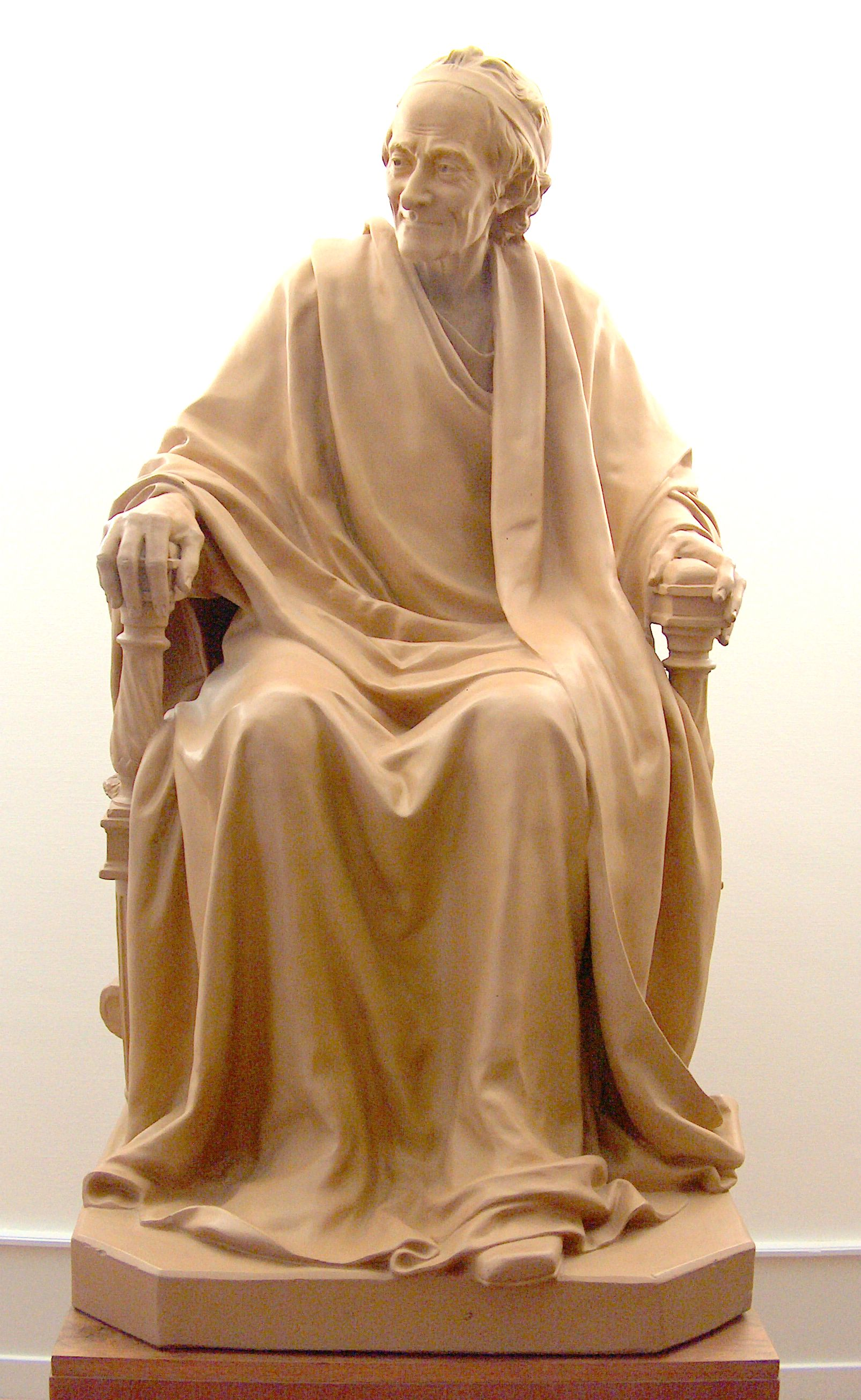 Statue de Voltaire, Institut et Musée Voltaire - Ville de Genève- Suisse